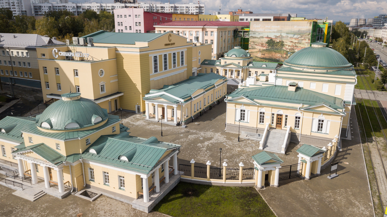 общий вид культурно-выставочного комплекса Синара Центр